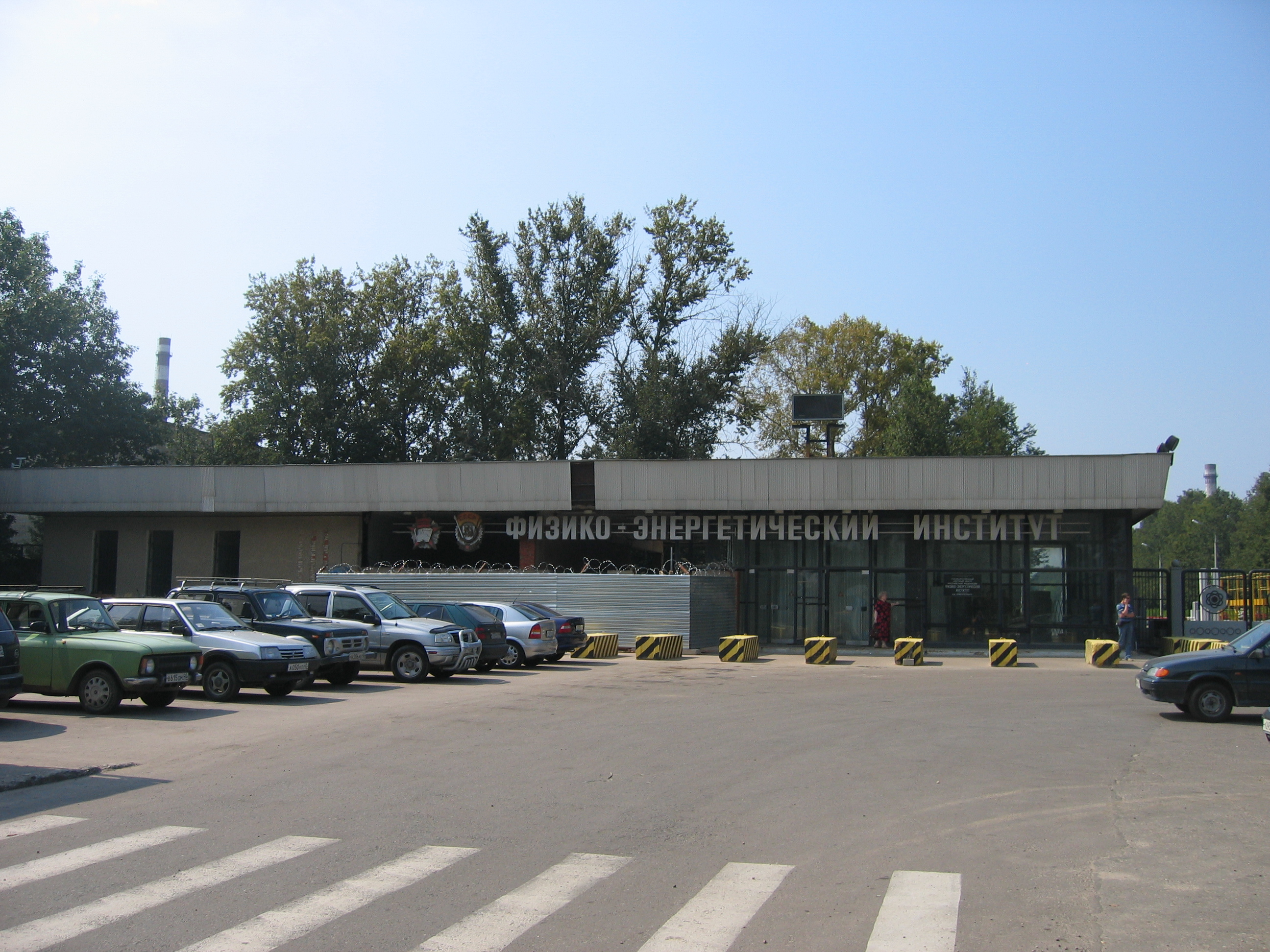 Das Institut für Physik und Energie in Obninsk, Russland, und Einfahrt zum ehemaligen Kernkraftwerk Obninsk